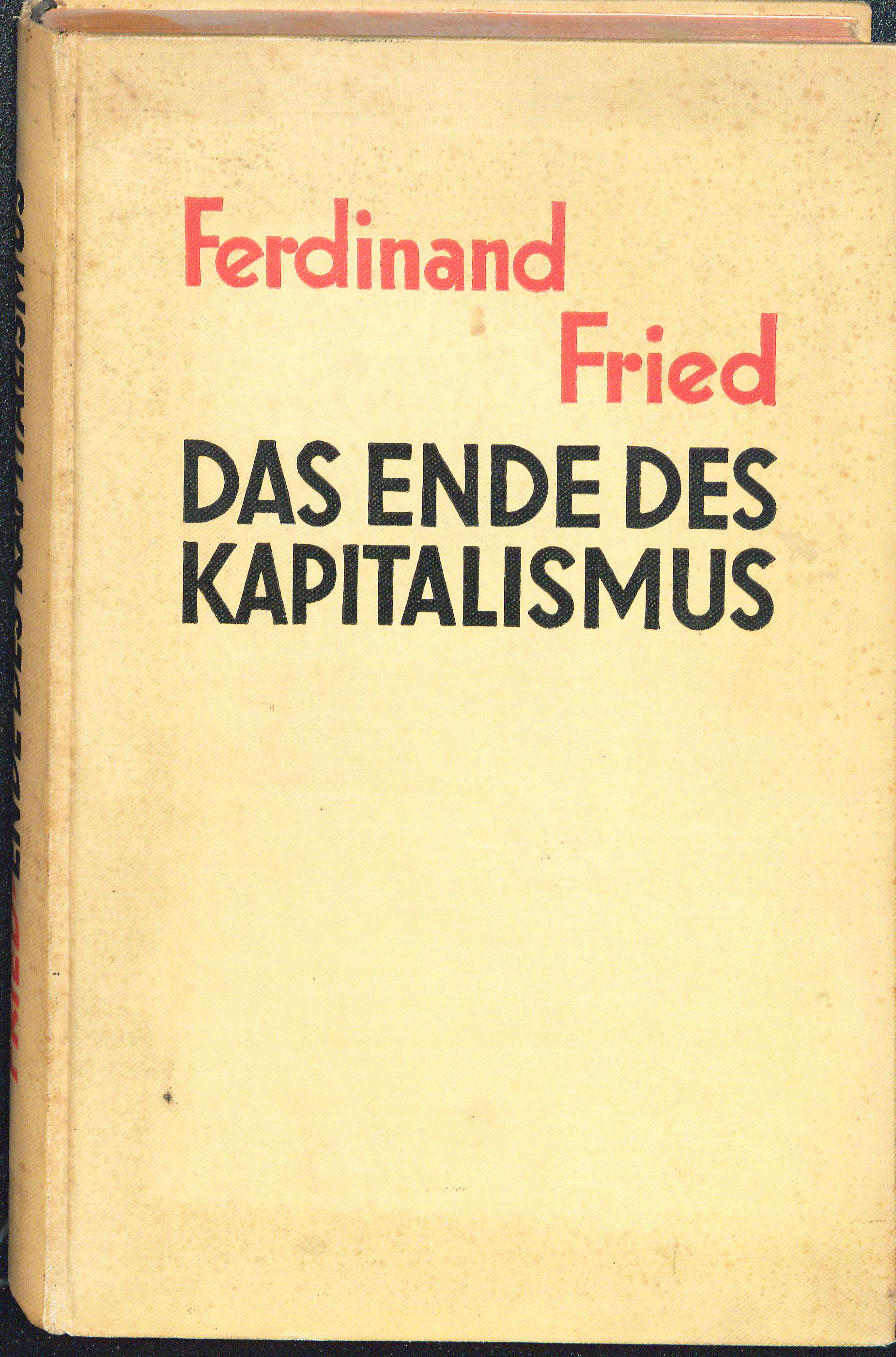 Ferdinand Fried: Das Ende des Kapitalismus.Eugen Diederichs Verlag in Jena 1931